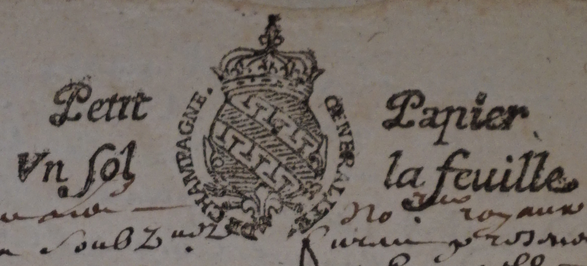 timbre de papier timbré de la Généralité de Chaalons. détail du manuscrit.